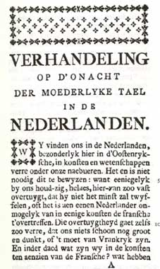 1st page Verhandeling op d’onacht der moederlyke tael in de Nederlanden